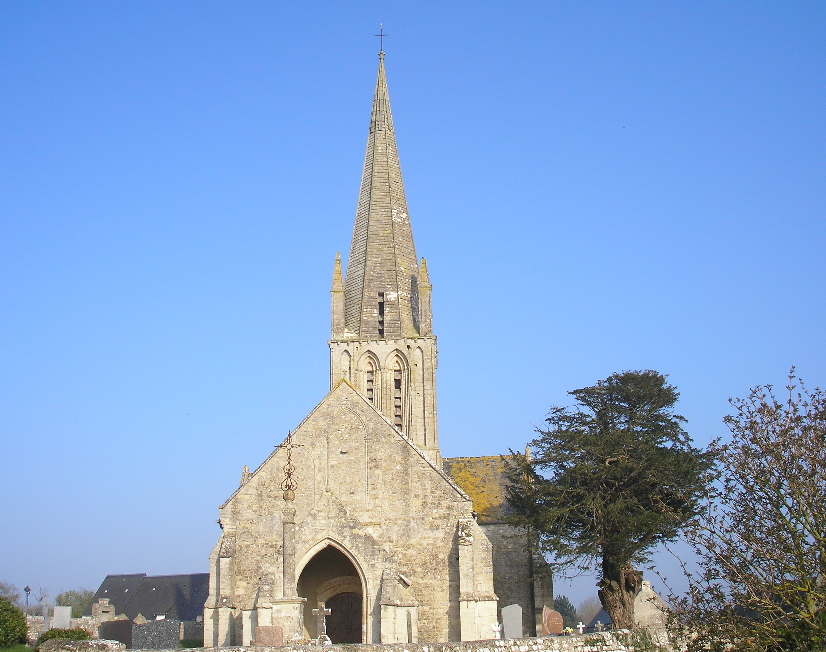 Louvières. (Normandie, France). L'église Notre-Dame.